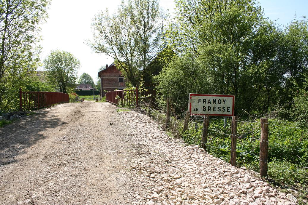 Panneau situé près du moulin de Frangy-en-Bresse.